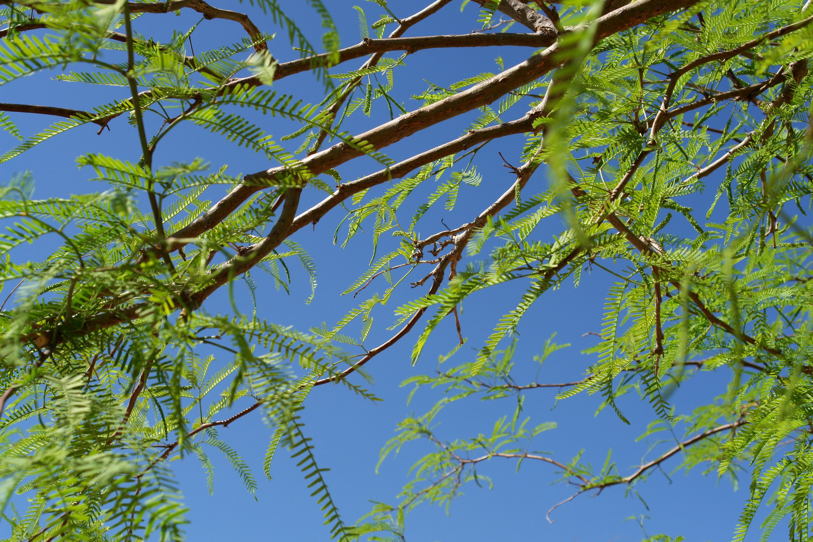 Green Tree - Blue Sky